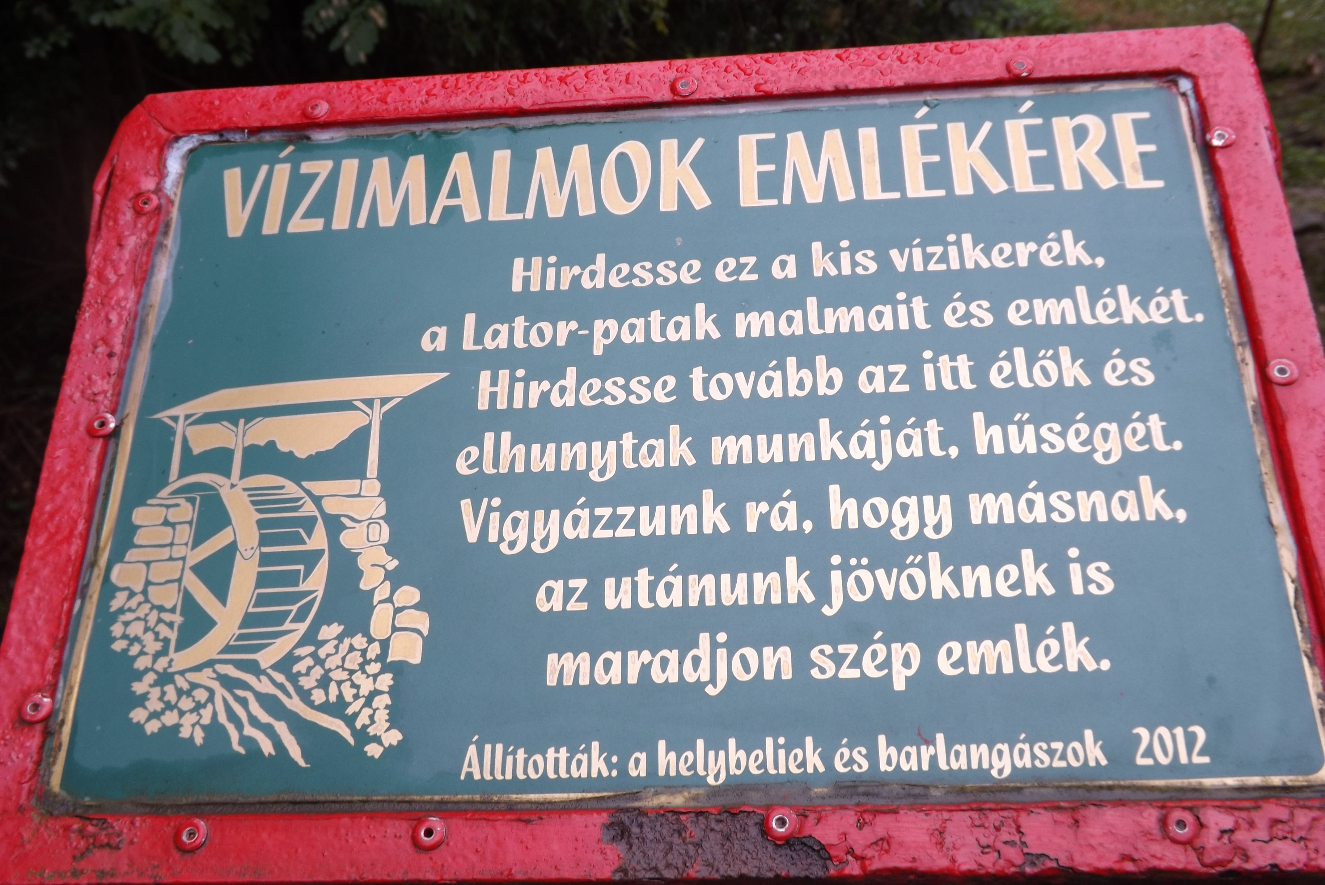 Emléktábla a Vízfőbarlang patakjának hídján, Latorpuszta